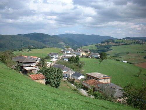 Zardaín vista